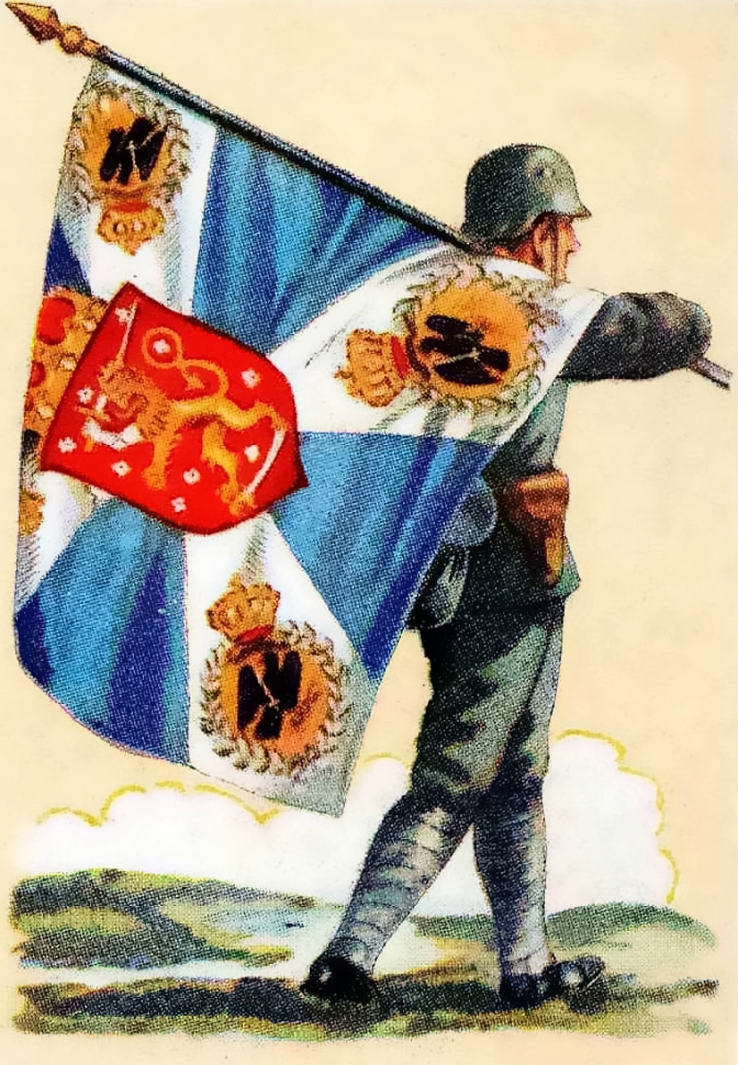 Fahne des Königlich-Preußischen Jäger-Bataillons Nr. 27.